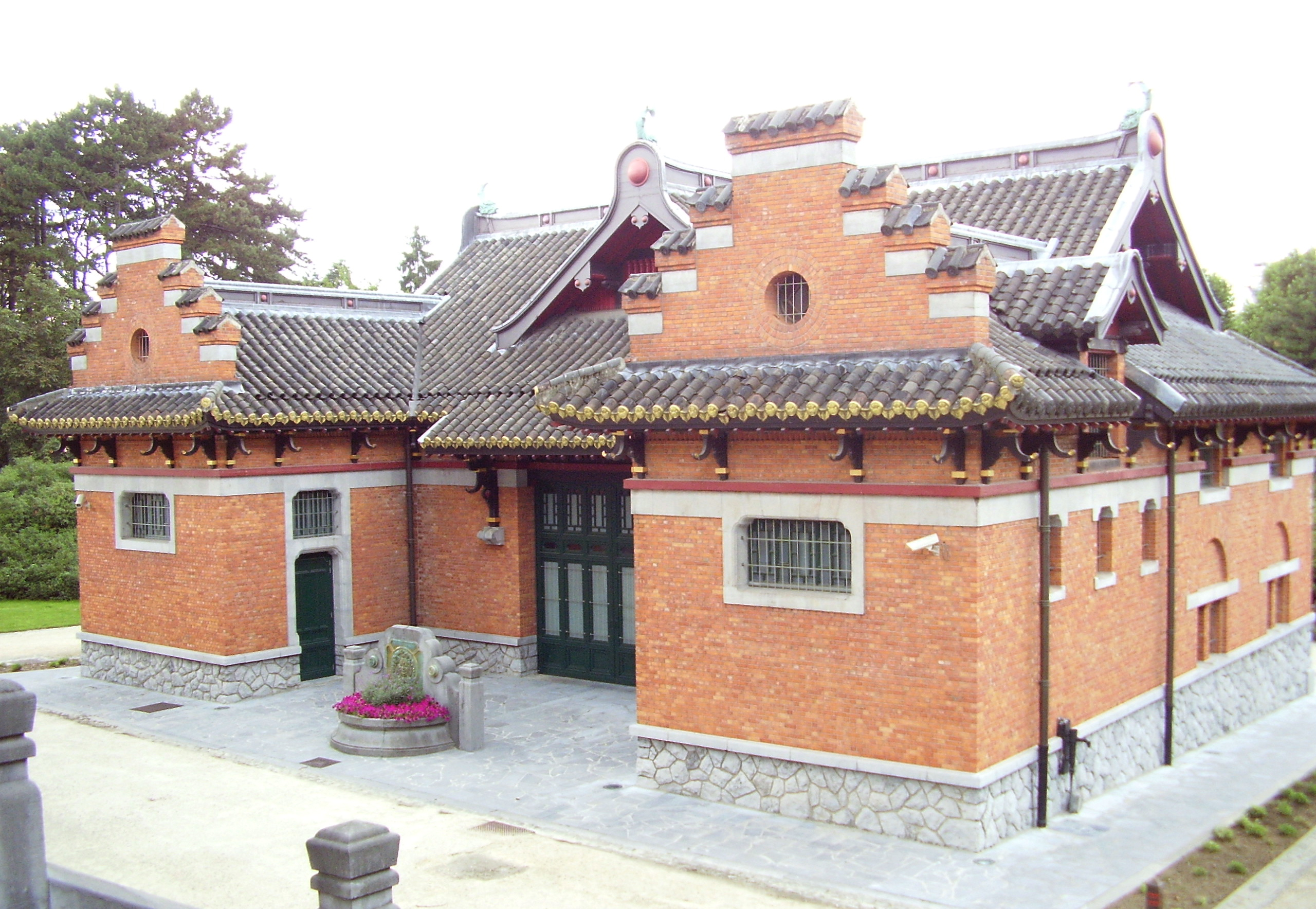 Musée d’Art japonais, Laeken (Bruxelles)